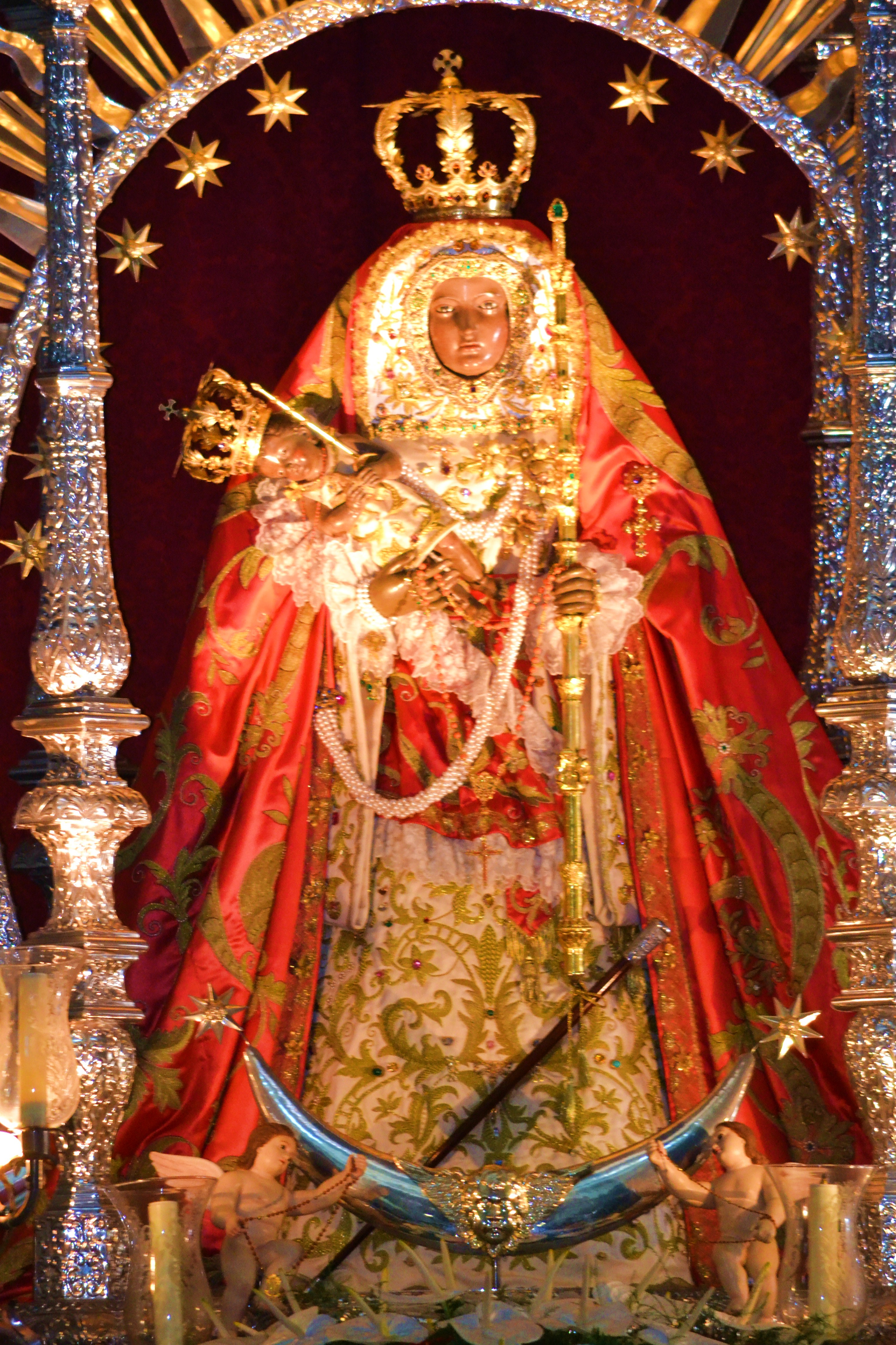 Colección Virgen de Candelaria by elduendesuarez Autor: Ángel Suárez-elduendesuarez